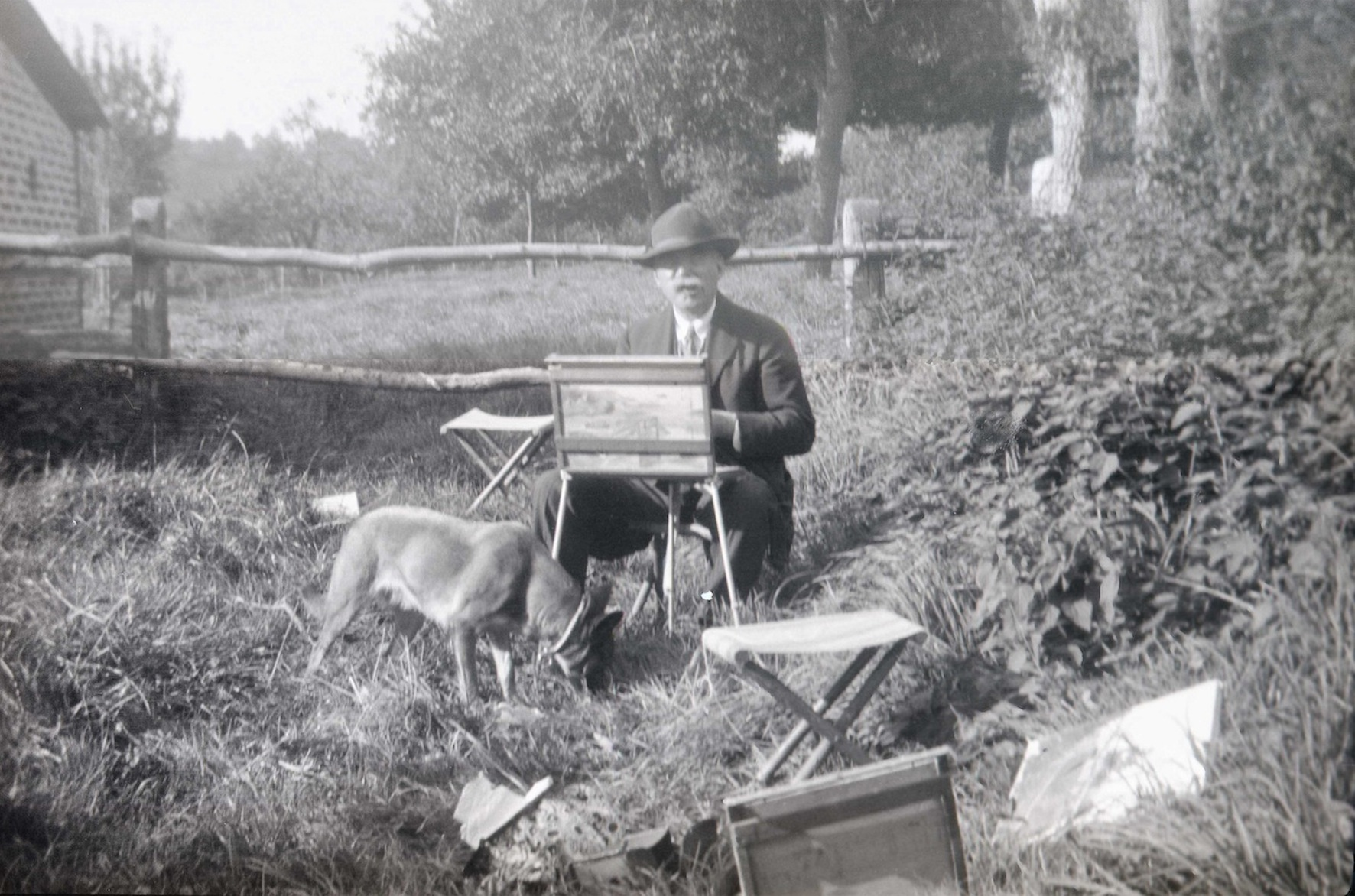 Julien Turbiau 1933, peint avec Loute, campagne de Villers-sur-Mer